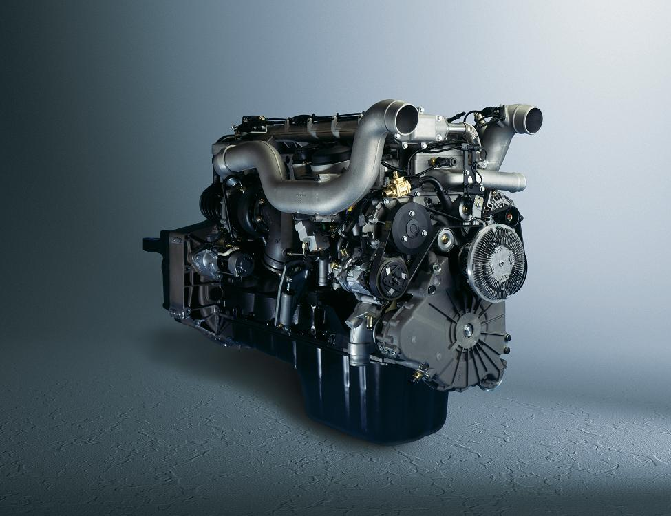 MAN Sechszylinder Dieselmotor, Typ D2066LF mit hydrodynamischem Retarder.